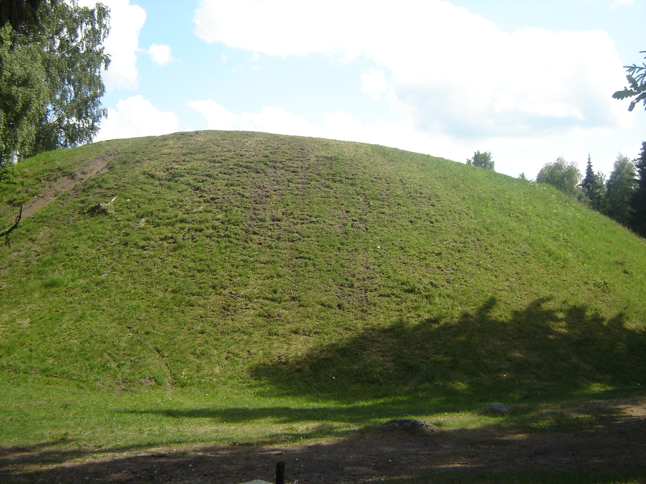 Lõhavere linnamäe nõlv